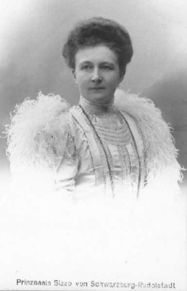 Alessandra di Anhalt, figlia del duca Federico I